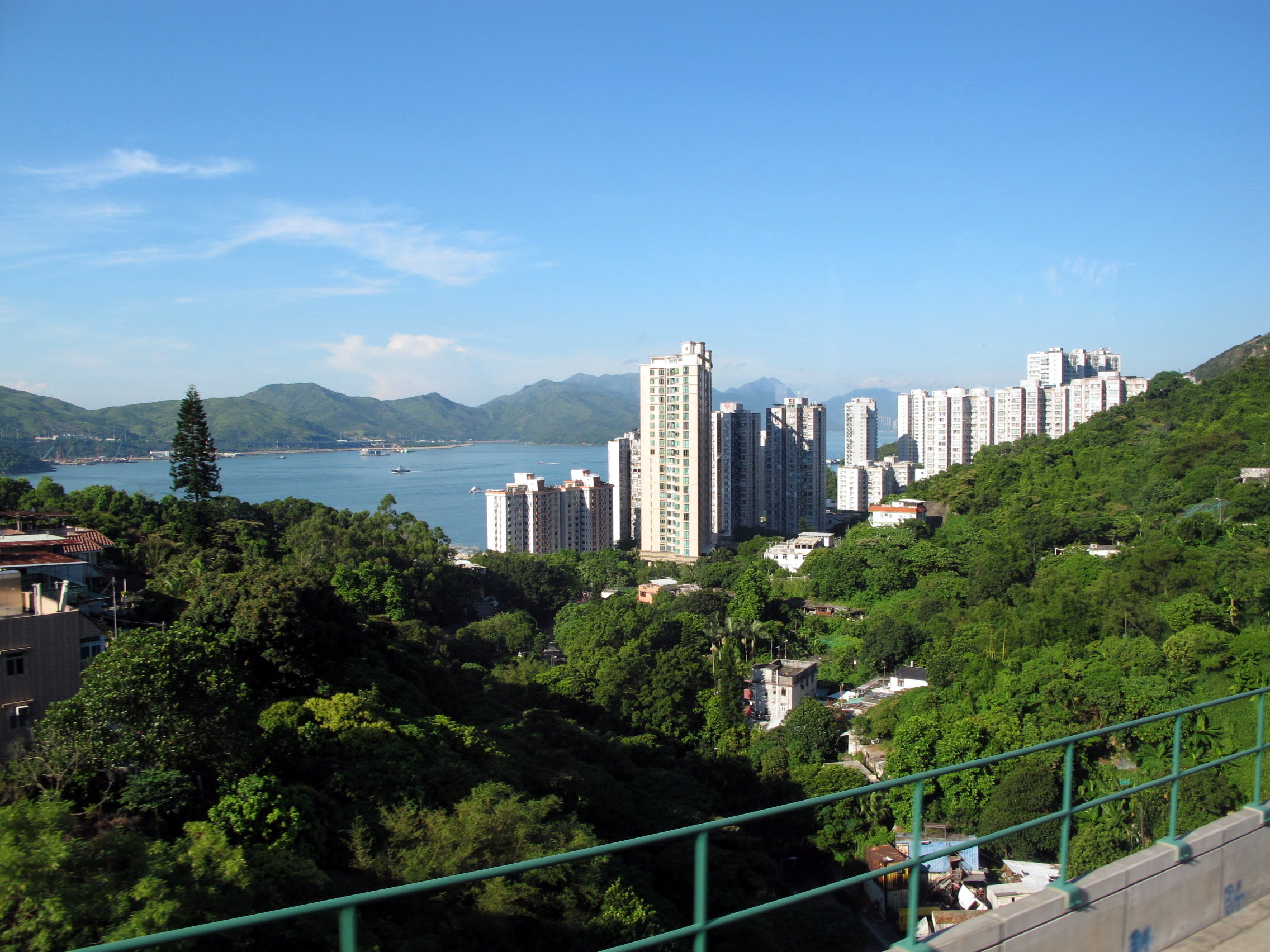 Tsing Lung Tau